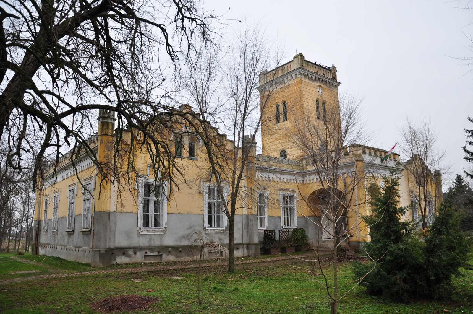 v. Rhédey-kastély (Zsáka, Felszabadulás utca 18.) This is a photo of a monument in Hungary. Identifier: 5403